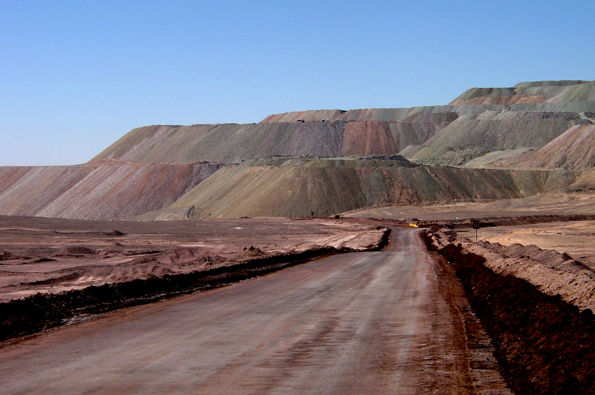 Vu d'une partie de la Mina Escondida, l'une des plus grande mine de cuivre du monde.